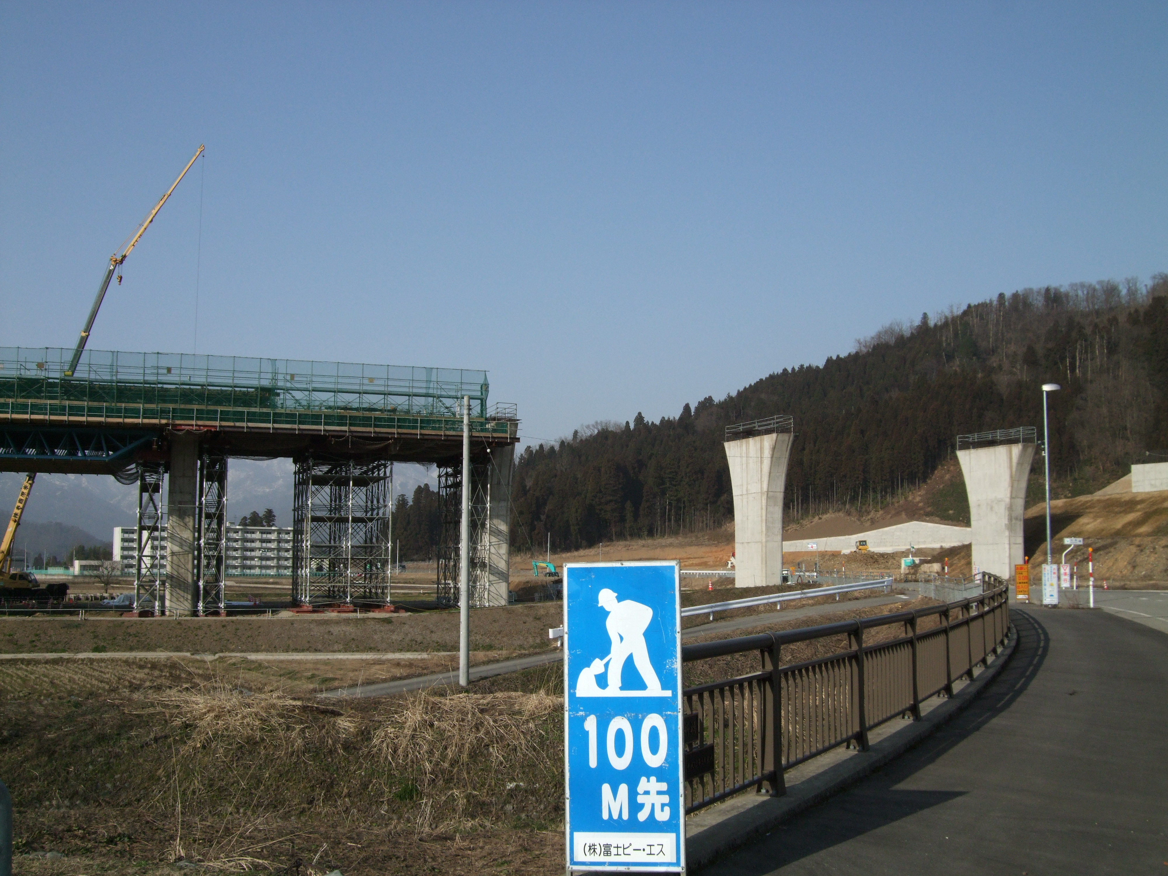 中部縦貫自動車道（永平寺大野道路） 勝山インターチェンジ付近 建設当時の鹿谷高架橋 2008.3.17 投稿者が撮影